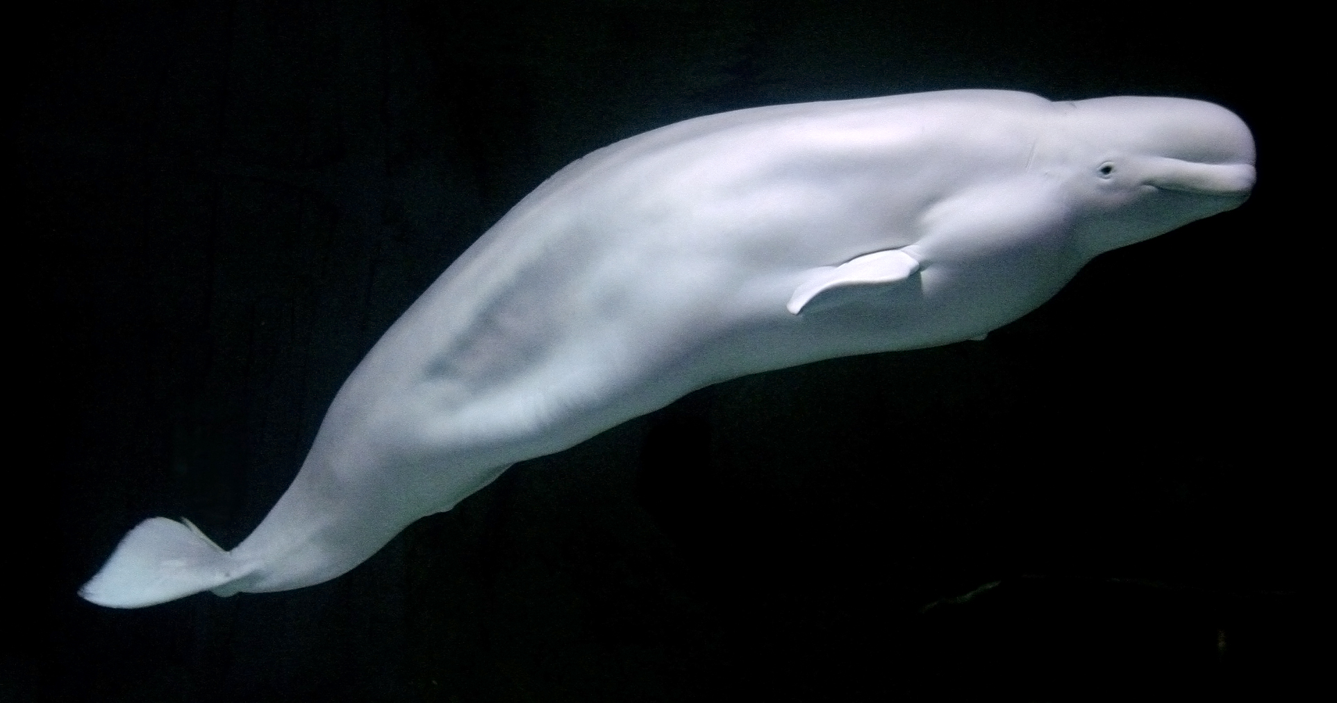 Ciudad de las Artes y las Ciencias. Valencia.